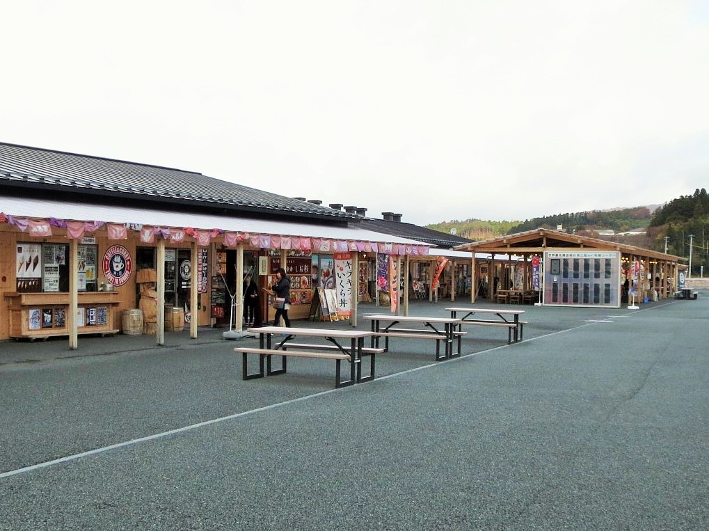 2018年の南三陸町さんさん商店街 Canon IXY 3